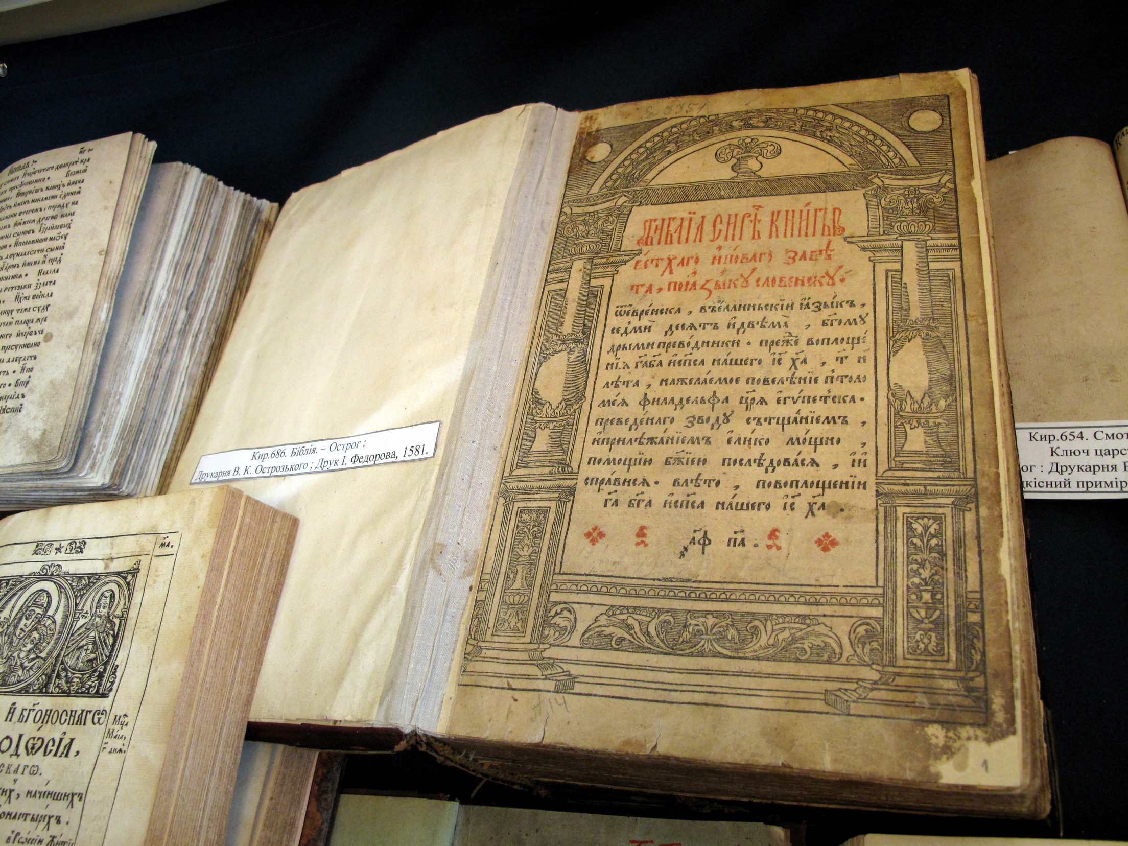 Острозька біблія